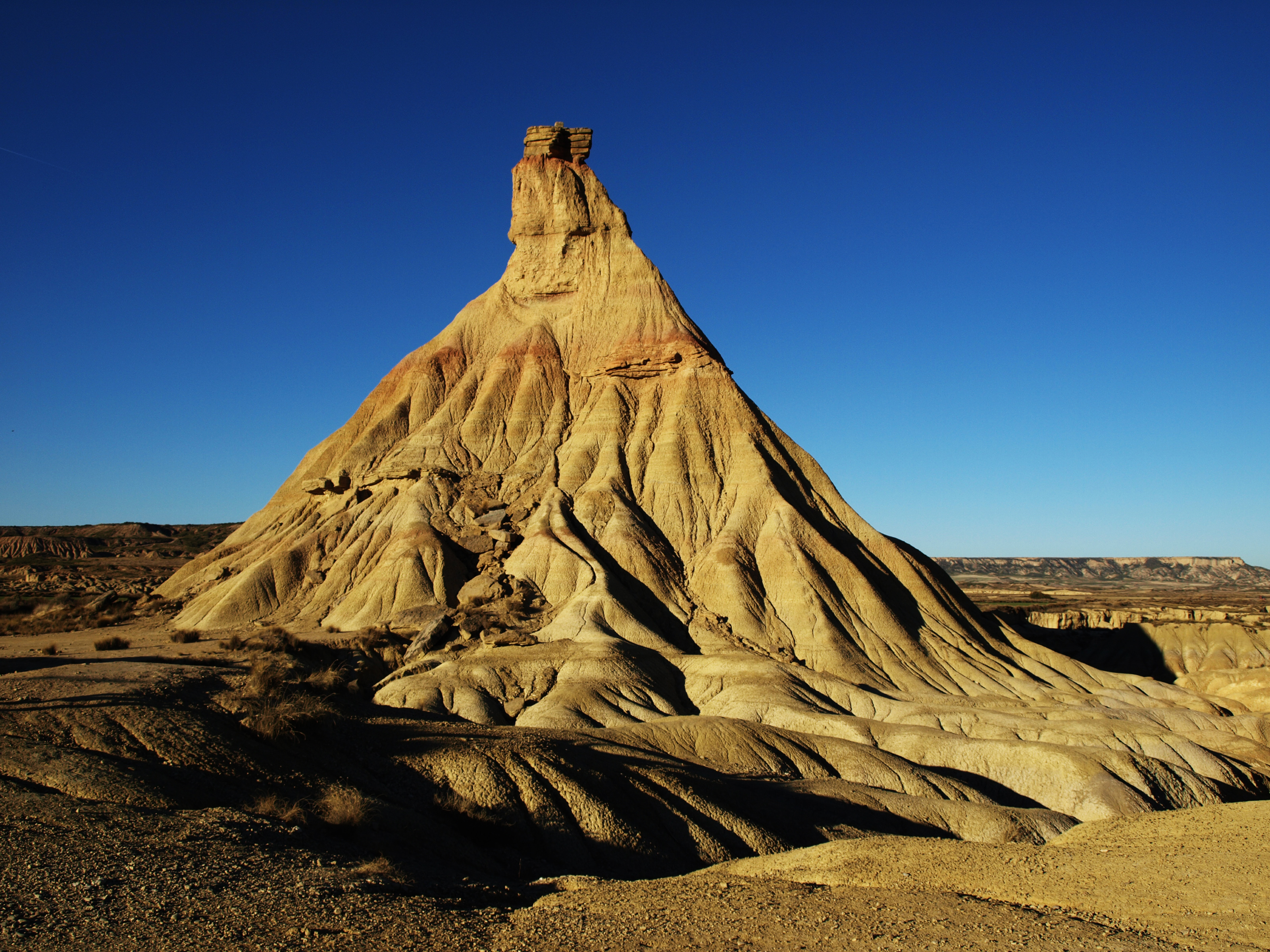 Bardenas Reales This is a photography of a Special Area of Conservation in Spain with the ID: ES2200037. Natura2000 entry, EEA entry